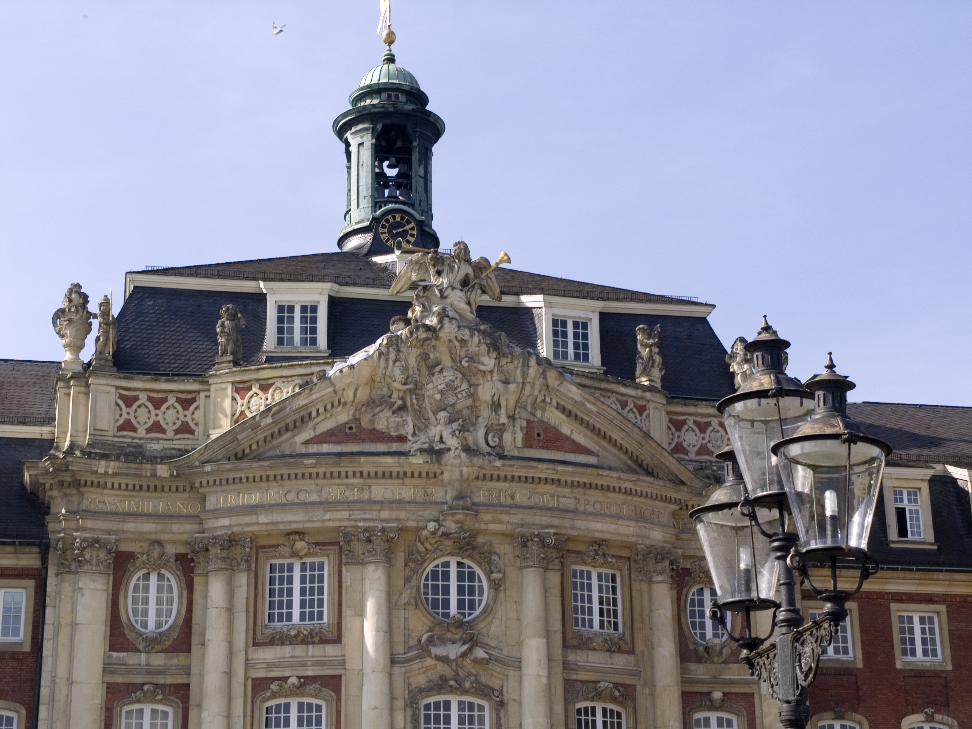 Северный Рейн - Вестфалия, Мюнстер - Мюнстерский дворец